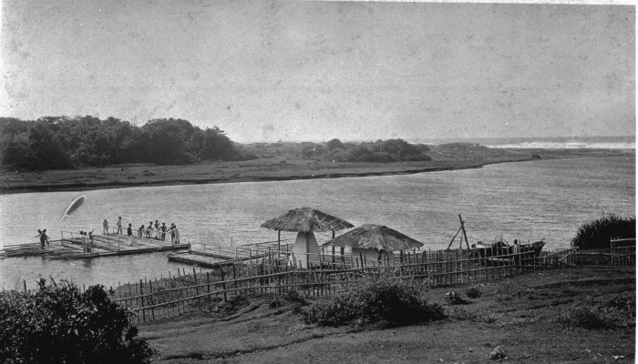 Foto. Een veerpont over de Tjipandak rivier tussen Sindangbarang en Tjidaoen, aan de zuidkust van de Preanger, West-Java